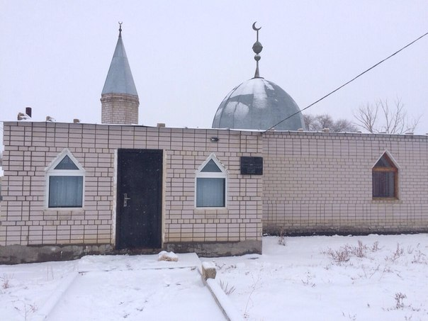 Сағашилі мешіті